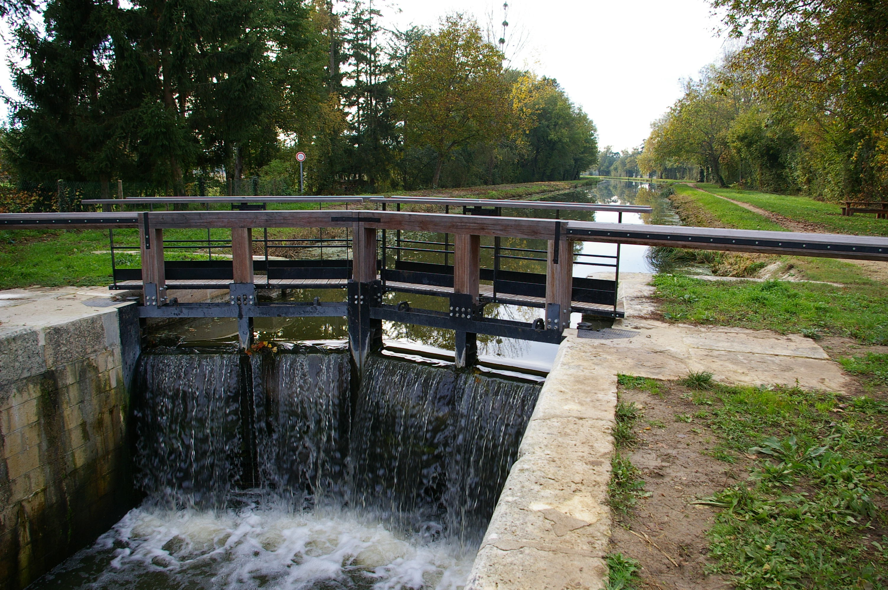 Ecluse de Chancy sur le canal d'Orléans